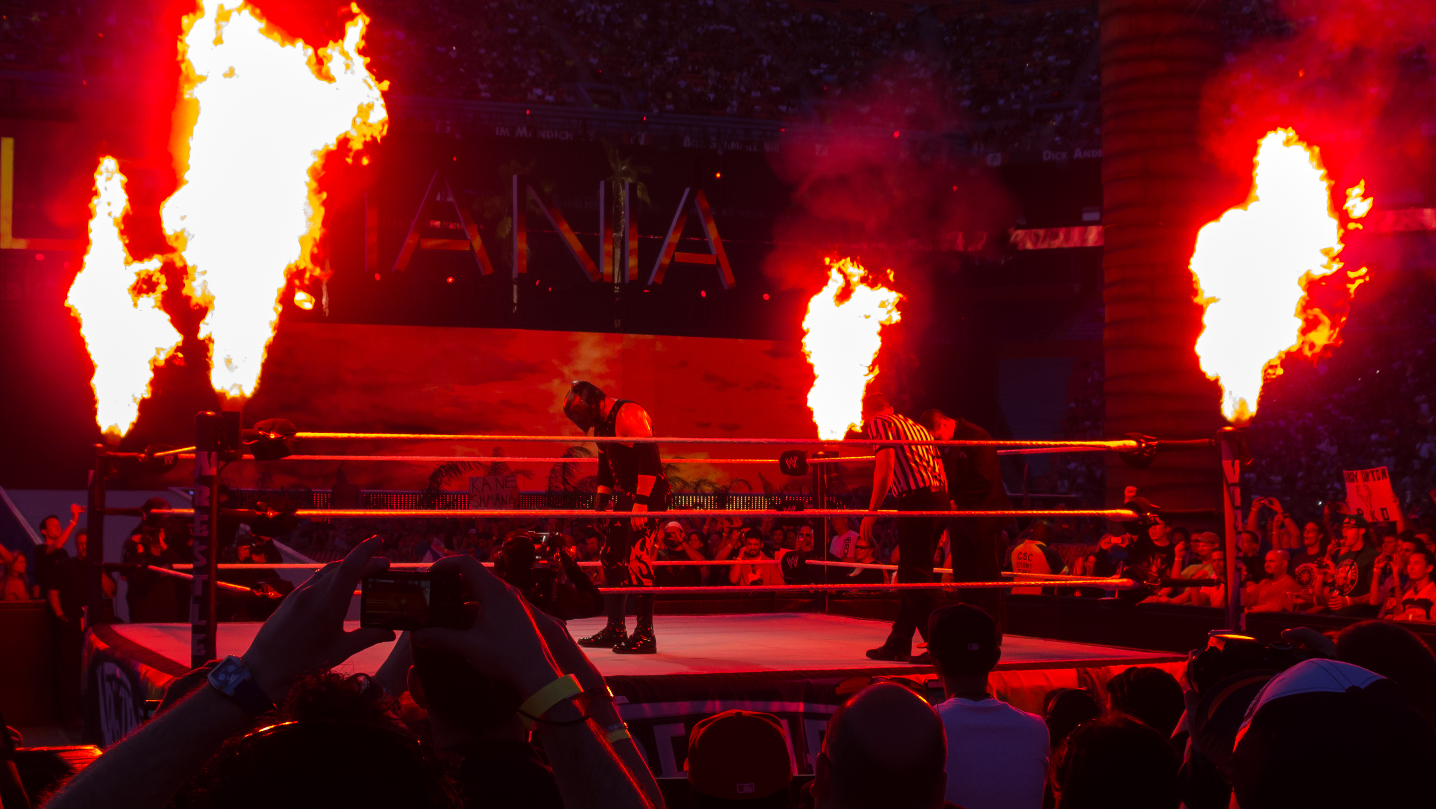 Kane at Wrestlemania XXVIII